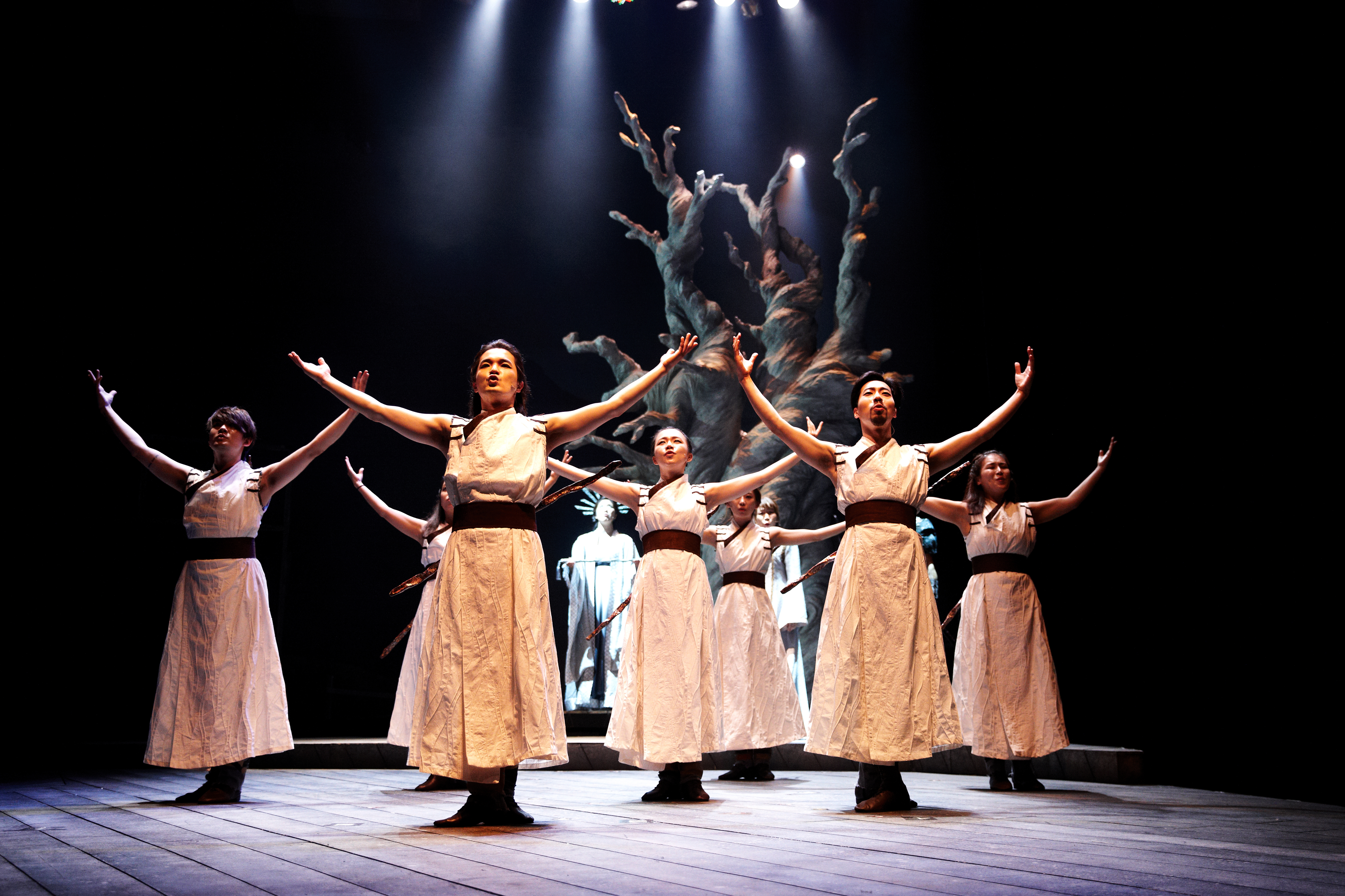 제13회 한성백제문화제 백제문화공연